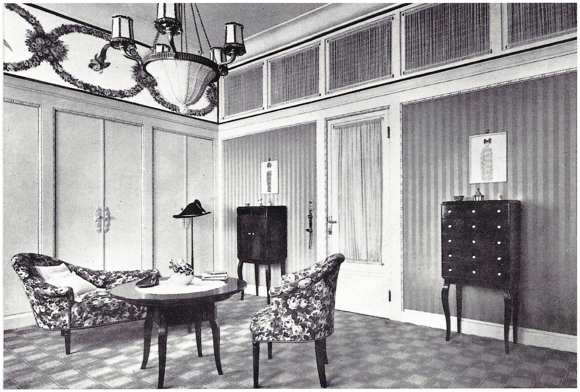 Haus Feinhals (erbaut 1908/09, 1943 kriegszerstört), Lindenallee 3, Köln-Marienburg: Ankleidezimmer der Dame